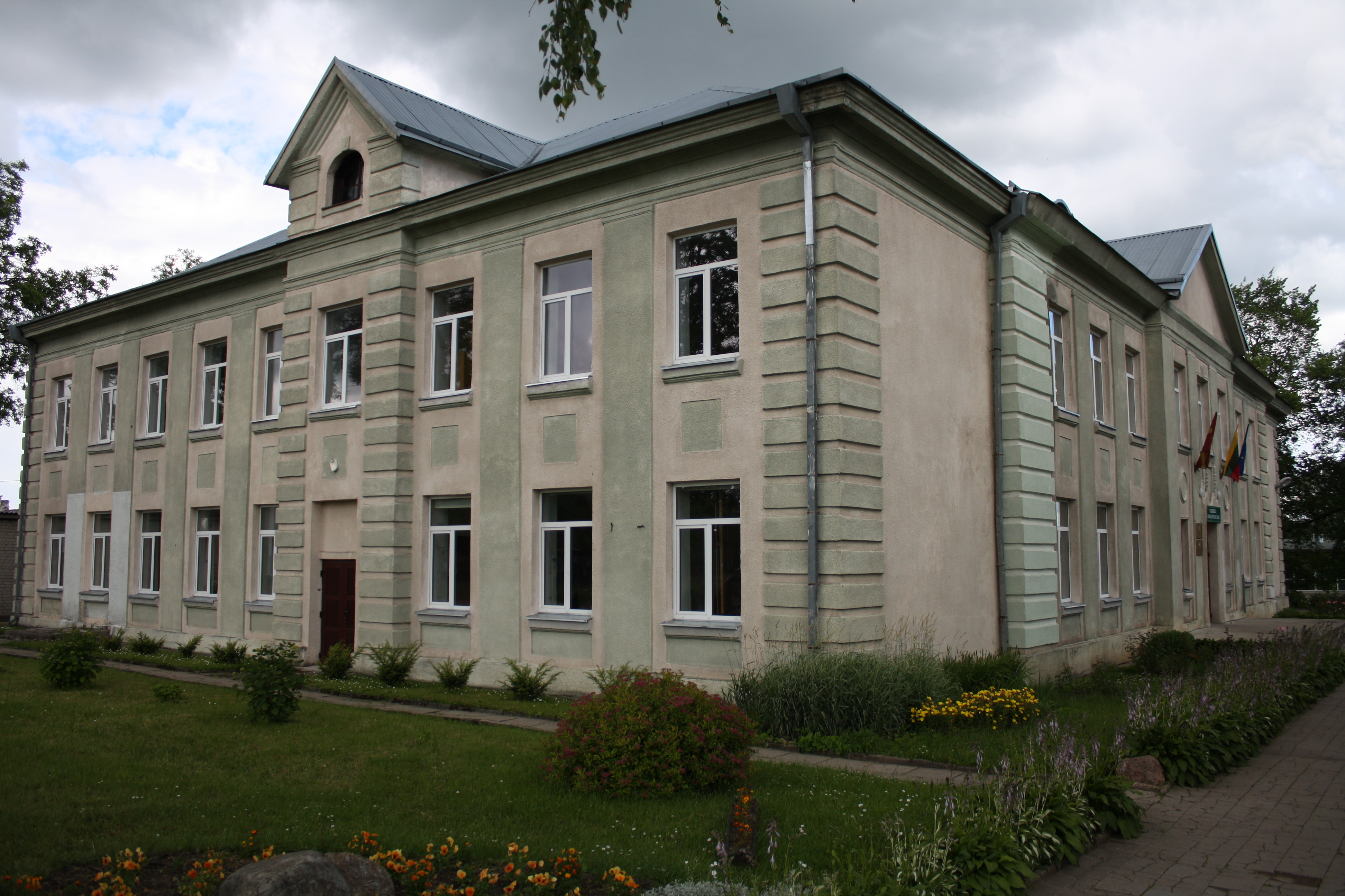 Vilniaus Juzefo Ignacijaus Kraševskio vidurinė mokykla